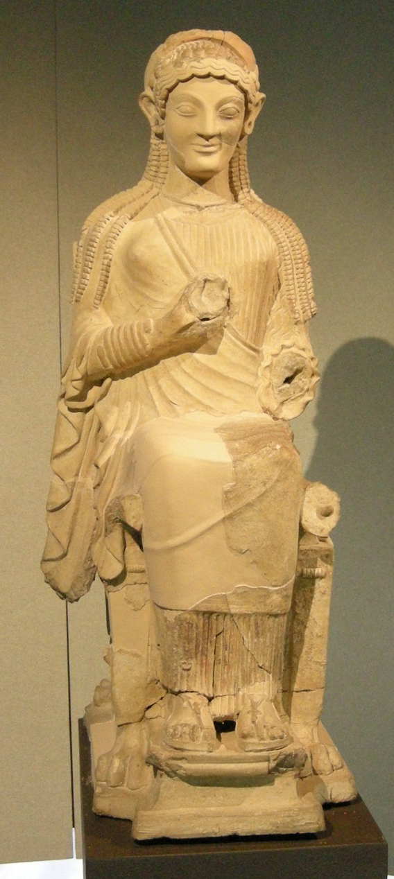 Museo archeologico regionale paolo orsi, statua votiva da Grammichele, fine VI-inizio V secolo a.c.